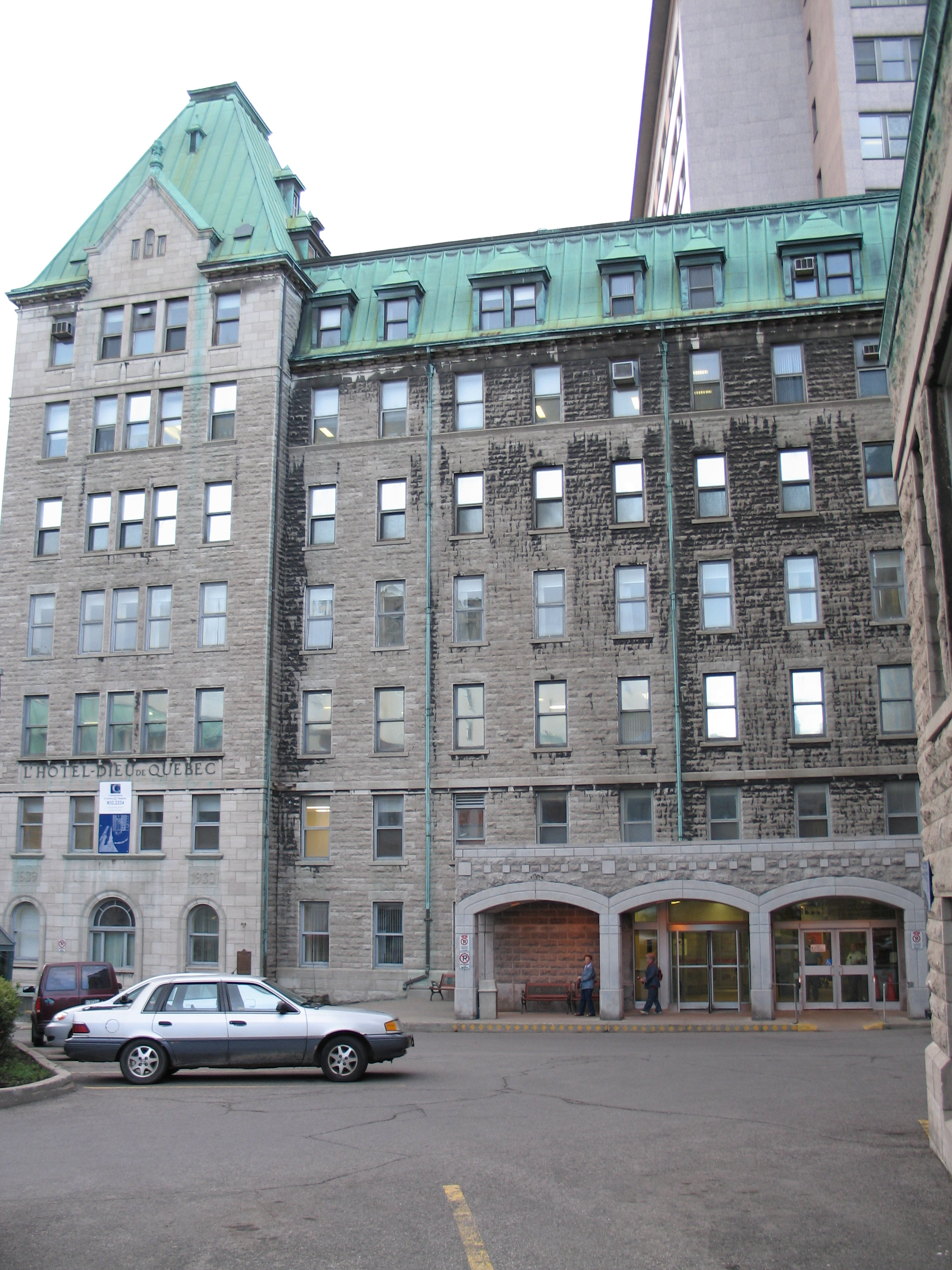 Façade de l'hôtel-Dieu de Québec, sur la côte du Palais, dans la vieille ville de Québec.